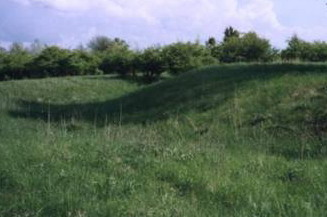 Hegyközcsatári földvár maradványai, Erdély